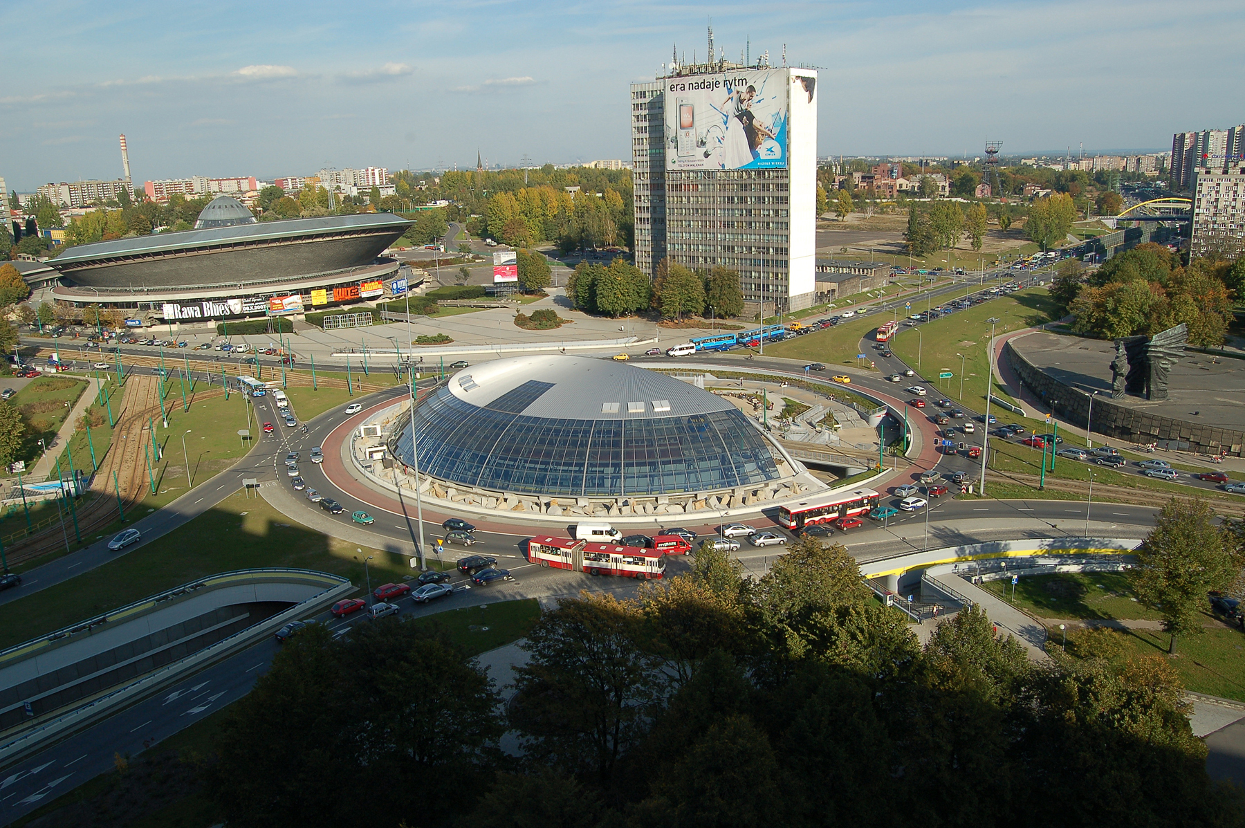 Rondo gen. Jerzego Ziętka w Katowicach, widok zapewne z Superjednostki.